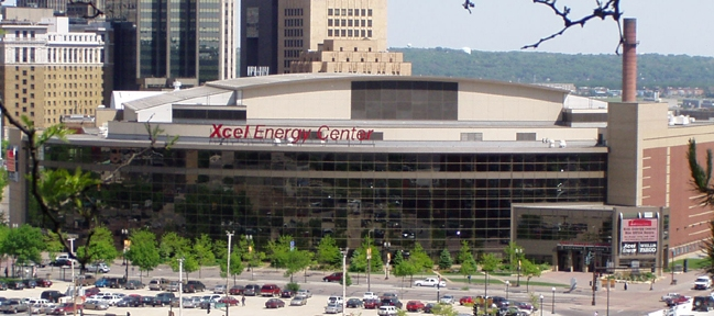 Xcel Energy Center taken from Selby Av:2006